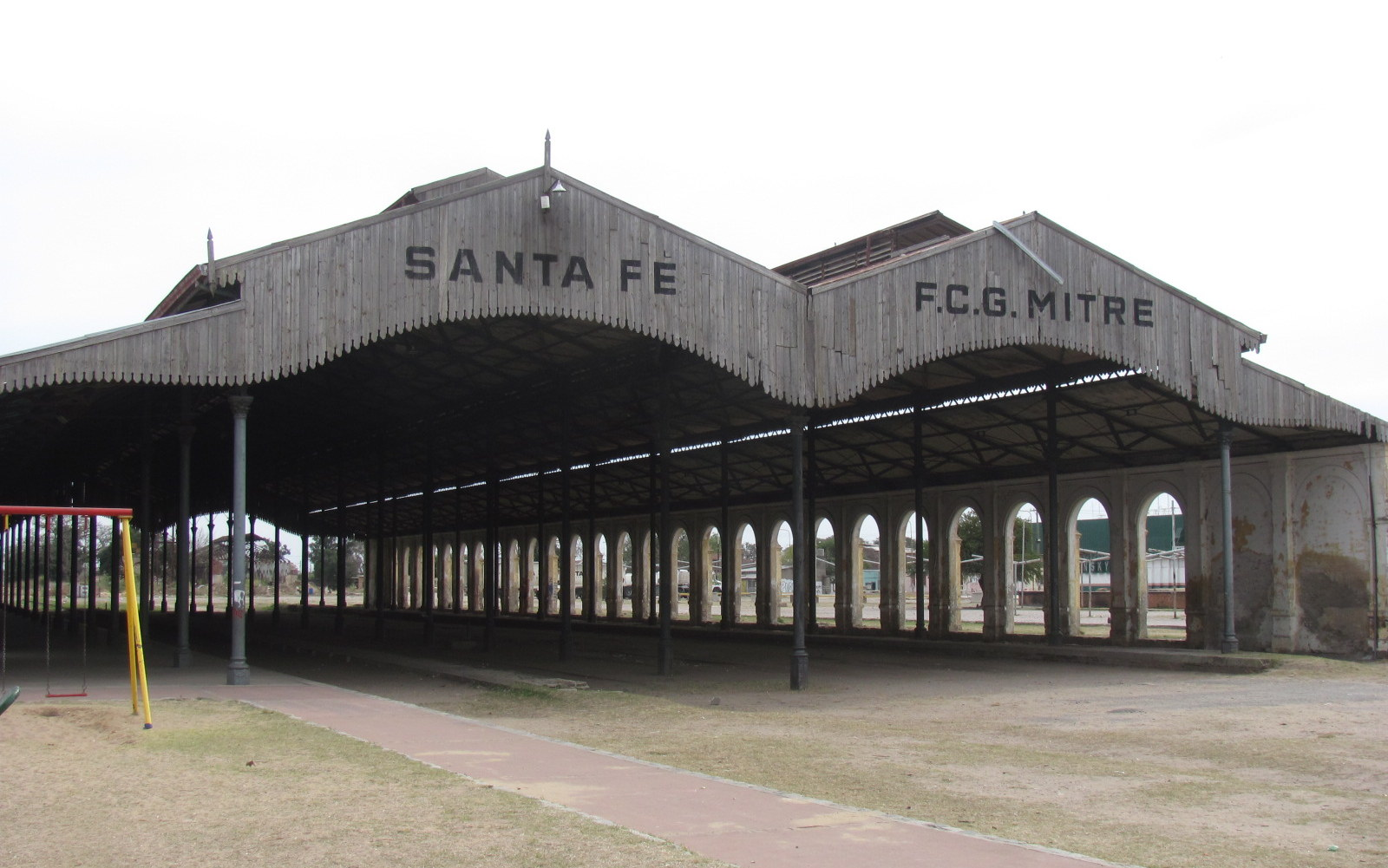 Estación Santa Fe Mitre, Ciudad de Santa Fe, Argentina